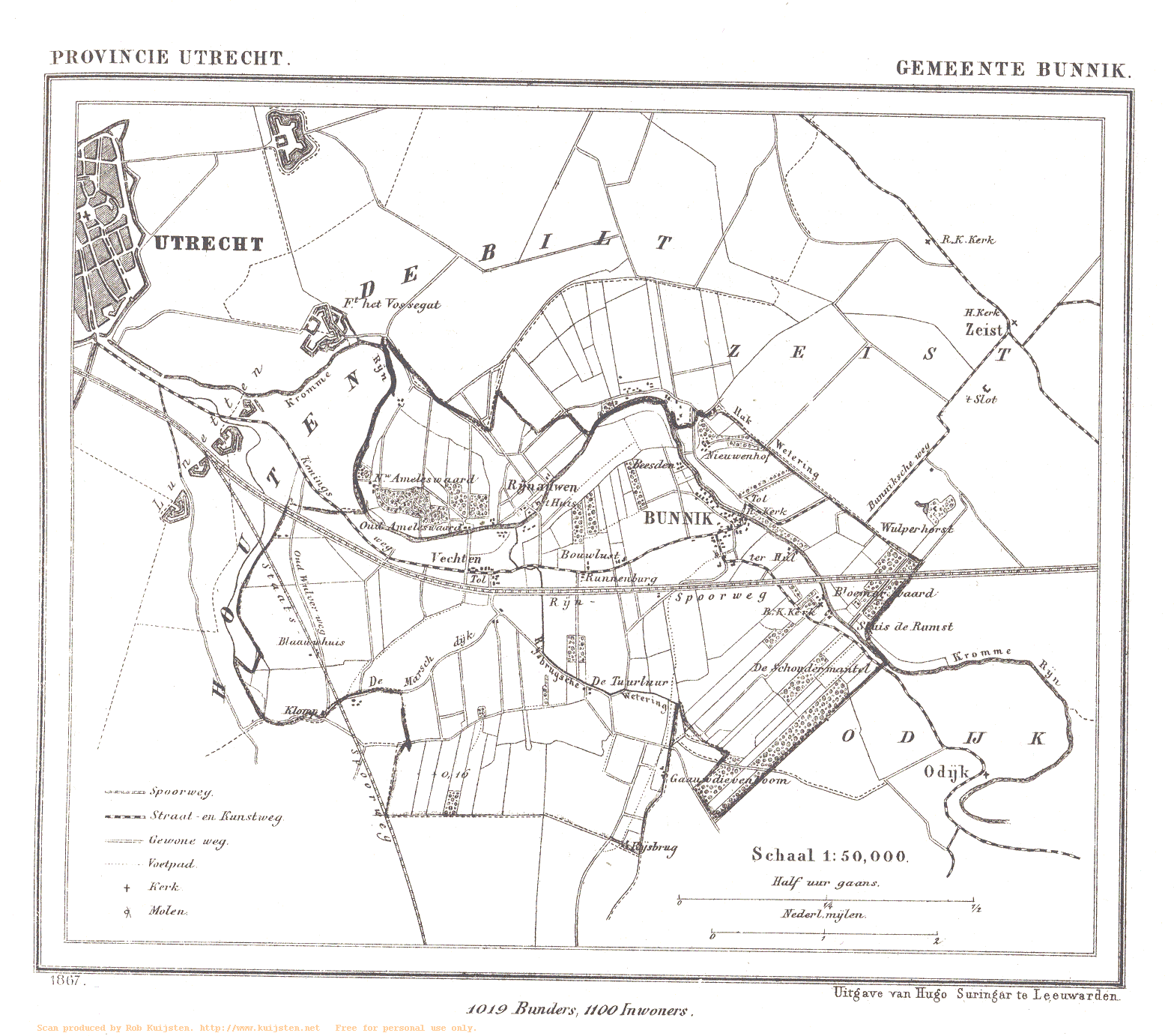 Kaart van Bunnik uit Gemeente Atlas van Nederland, J. Kuyper 1865-1870, Uitgave Hugo Suringar Leeuwarden.